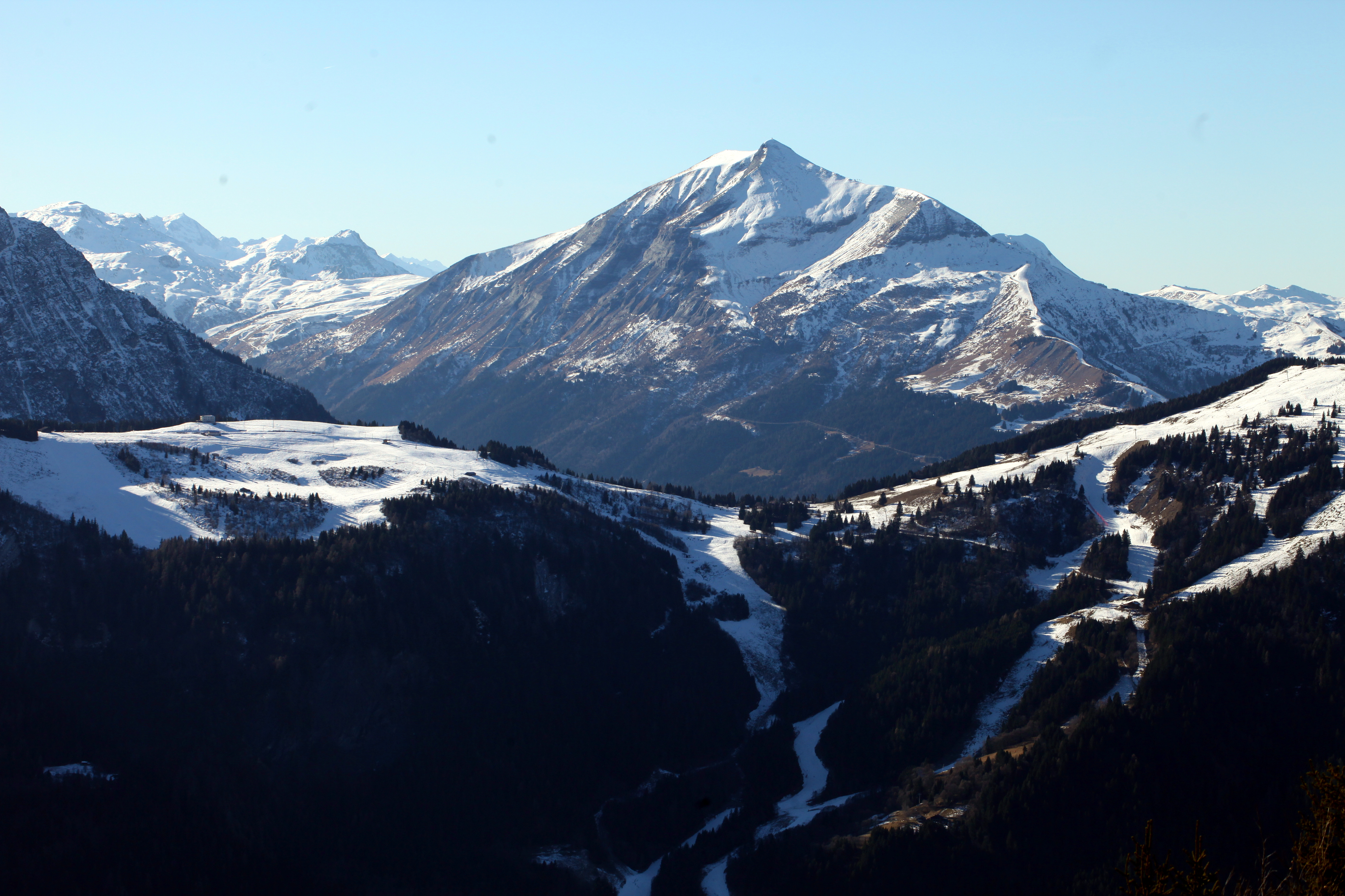 Le col de Voza et le Mont Joly vus de l'Aiguillette des Houches.